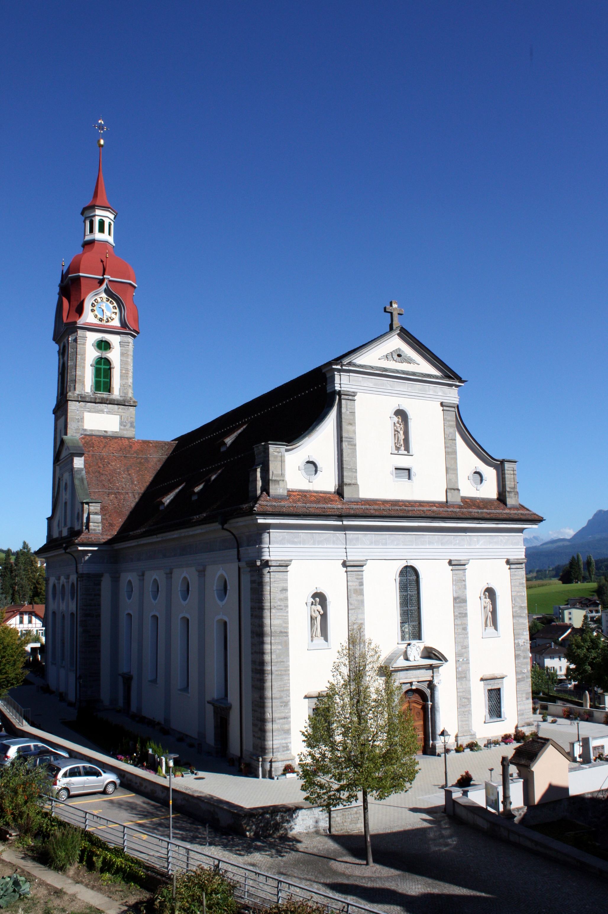 Kirche St. Mauritius, Ruswil (Nordwestansicht)